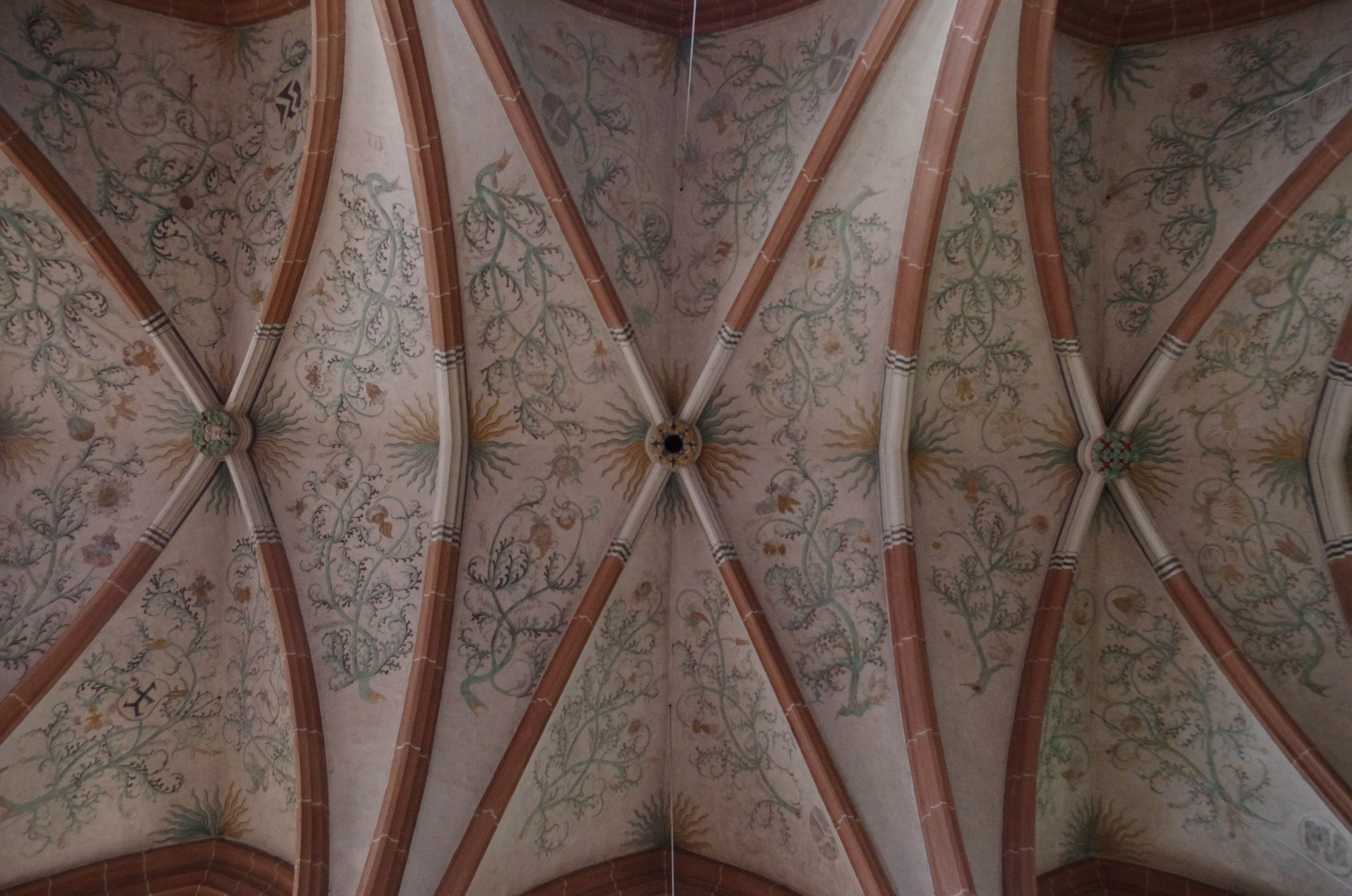 Frankenberg (Eder) in Hessen. Die Kirche ist im gotischen Stil erbaut worden. Sie befindet sich südlich der altstadt auf einen Hügel.